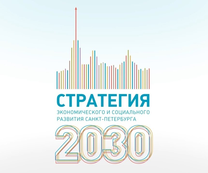 Стратегия экономического и социального развития Санкт-Петербурга до 2030 года